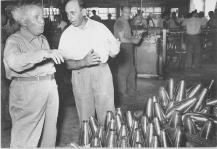 דוד בן גוריון בביקור ב"סולתם", 1960 מתוך הארכיון ע"ש אבא חושי ספריית יונס וסוראיה נזריאן, אוניברסיטת חיפה